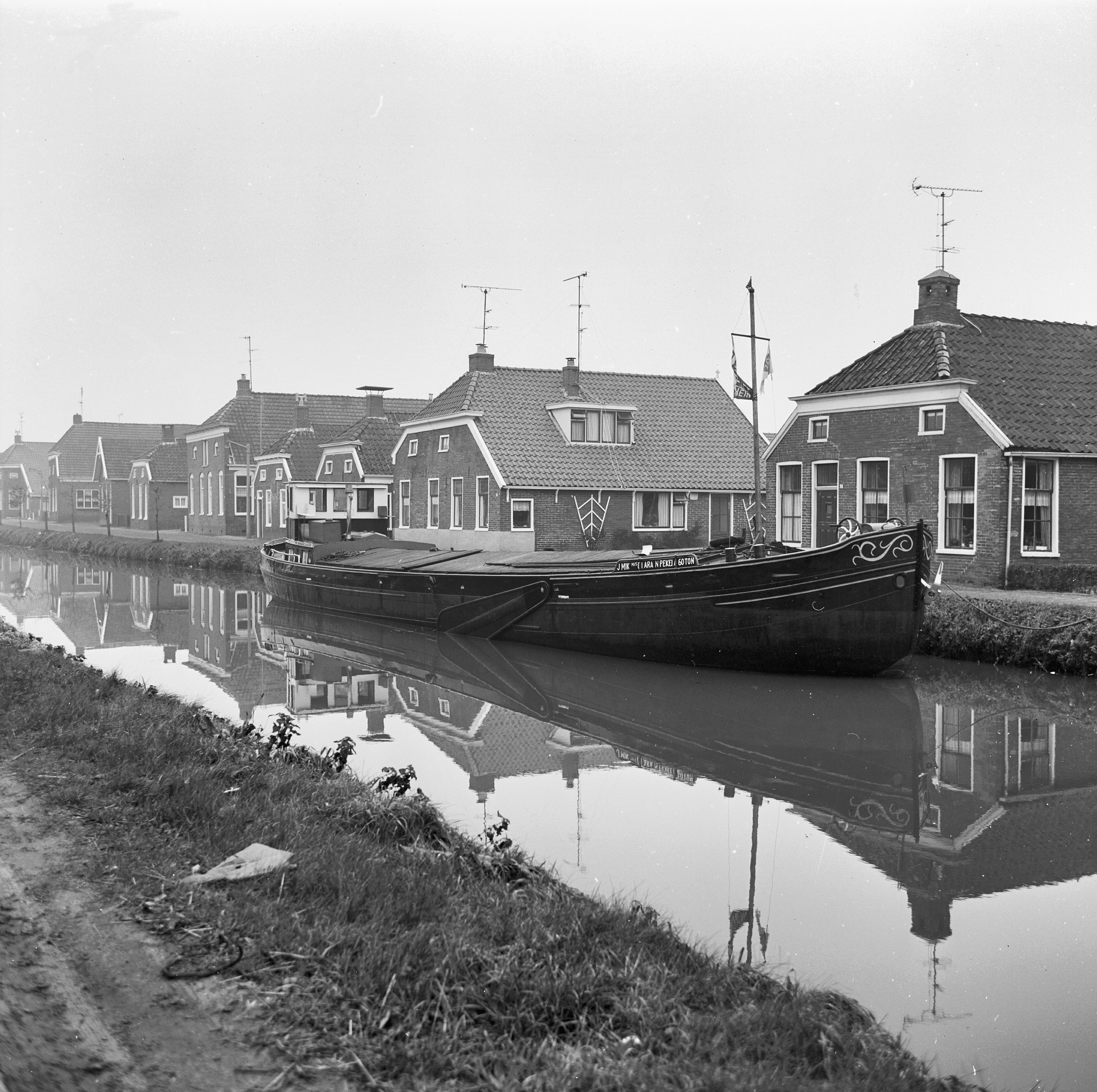 D.overzicht